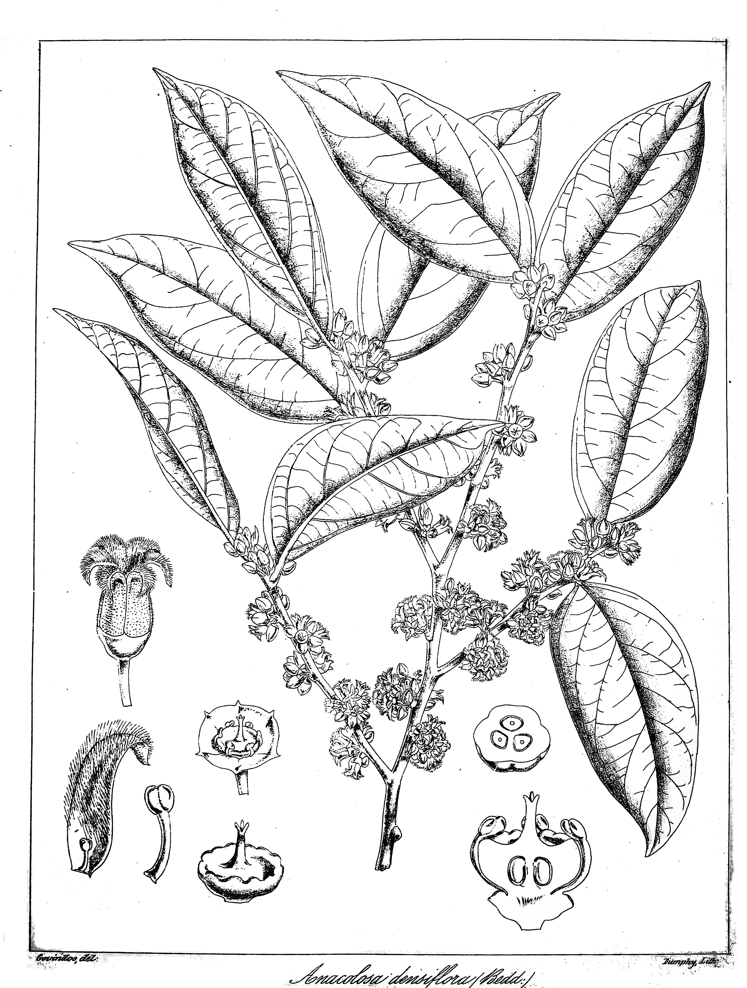 Anacolosa densiflora